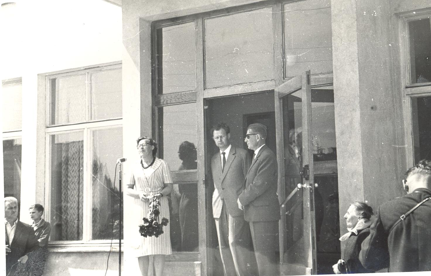 Uroczyste otwarcie nowego gmachu suwalskiej Powiatowej i Miejskiej Biblioteki Publicznej im. Marii Konopnickiej (maj 1963 r.). Przemówienie na schodach Biblioteki - z wiązanką kwiatów stoi ówczesna kierownik Biblioteki Jadwiga Towarnicka.